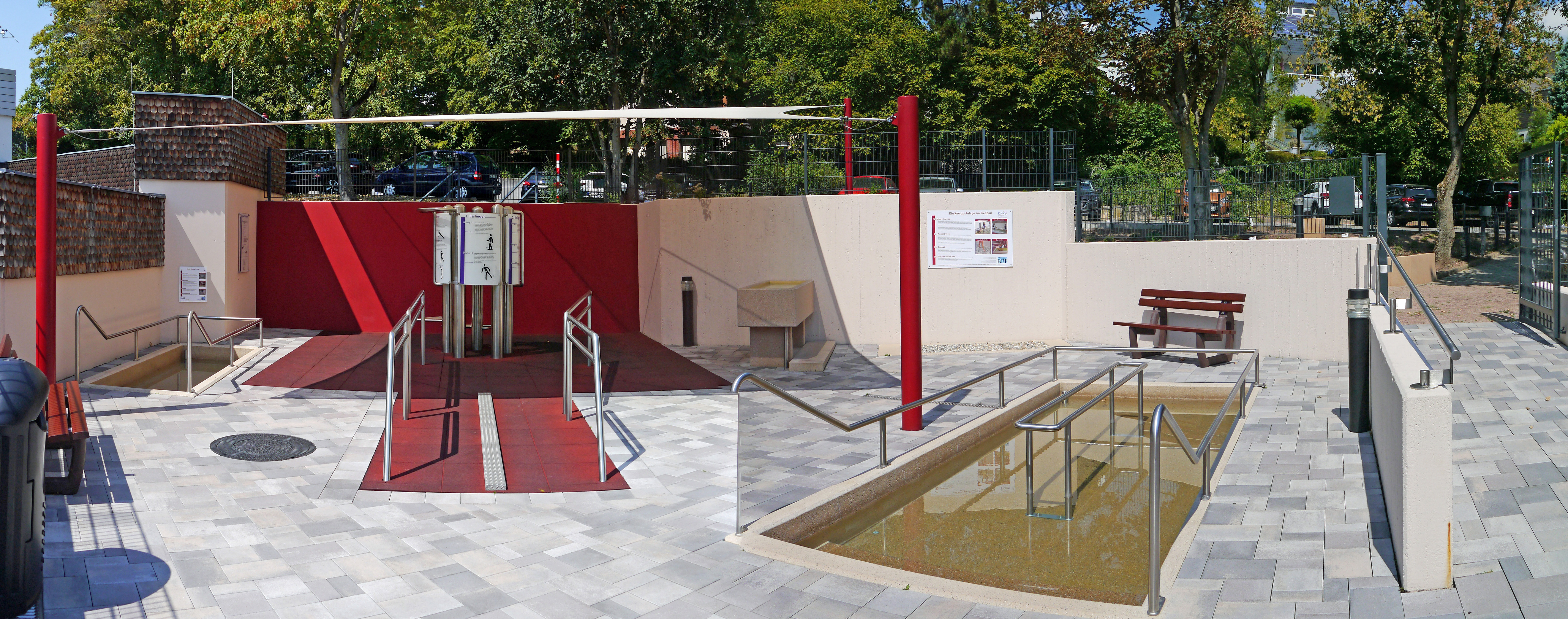 Kneipp-Anlage am Riedbad in Bergen-Enkheim mit (v.l.n.r.) Kinder-Wassertretbecken, 5-Esslinger-Gymnastik-Anlage, Arm-Tauchbecken, Fein- und Grobkiesel-Lauffeld und Erwachsenen-Wassertretbecken. Rechts vom Zugangsweg (außerhalb des Bildes) befinden sich noch 5 Felder mit verschiedenen Oberflächen zum Begehen zur Sohlenmassage.